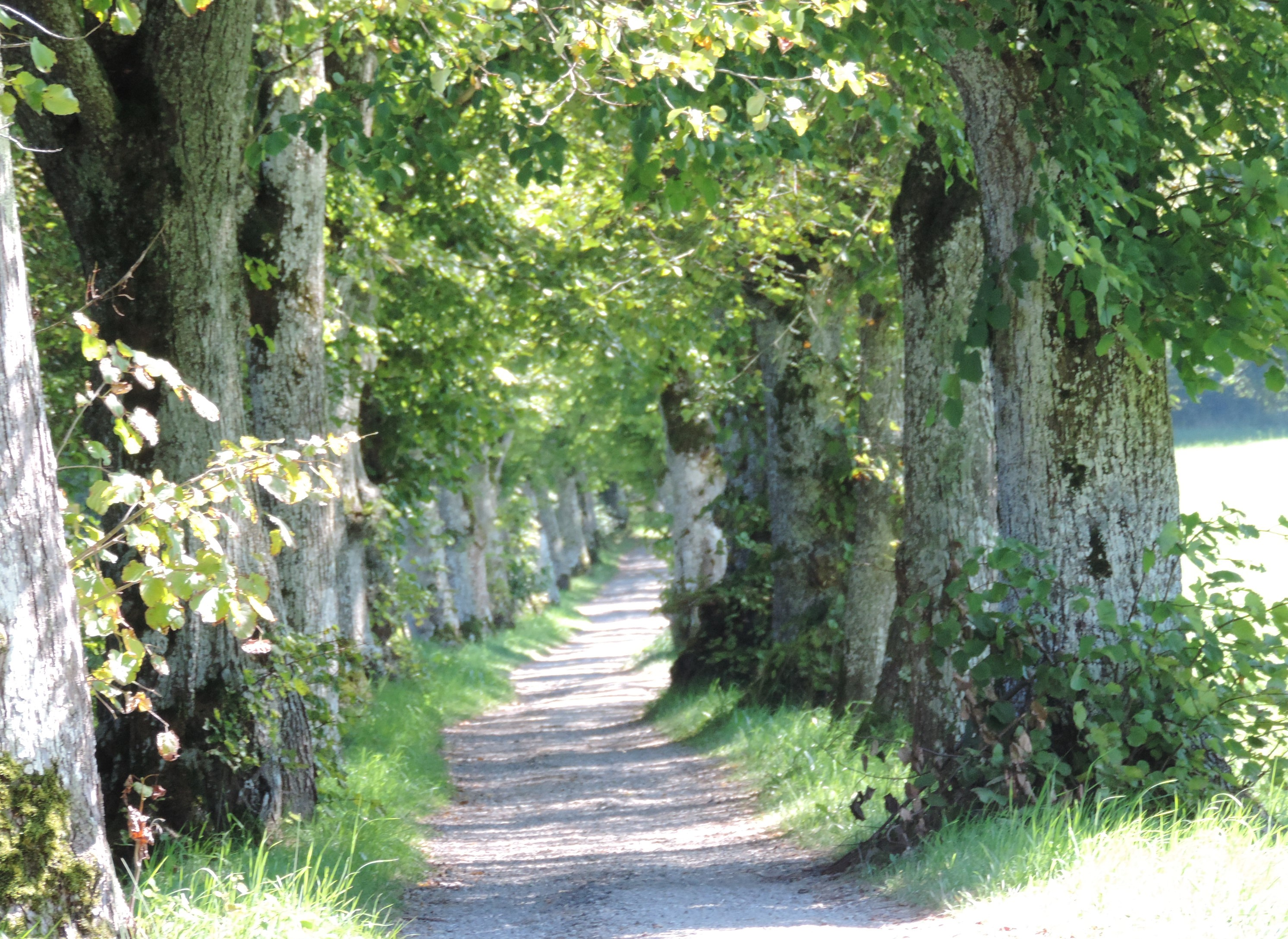 Lindenallee in Tutzing